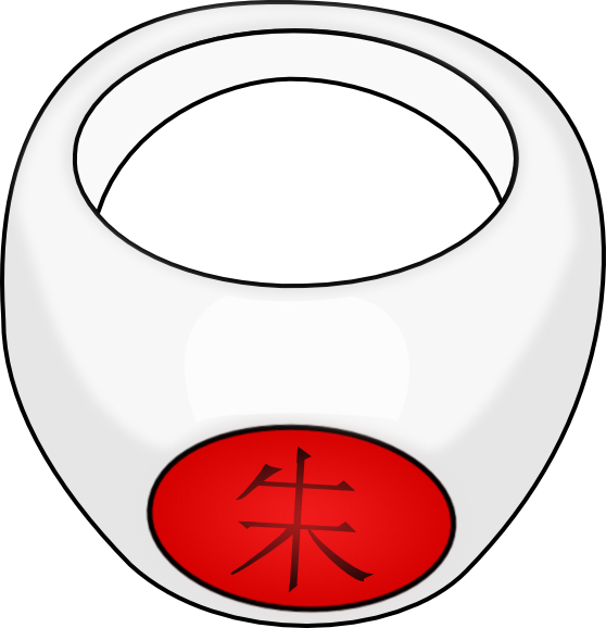 bague akatsuki itachi 朱